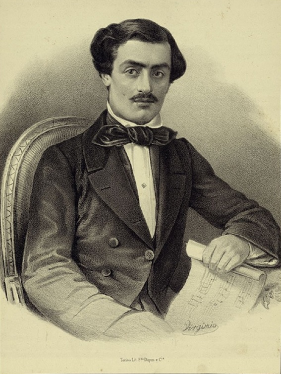 Guglielmo Andreoli senior (1835-1860), pianista e compositore